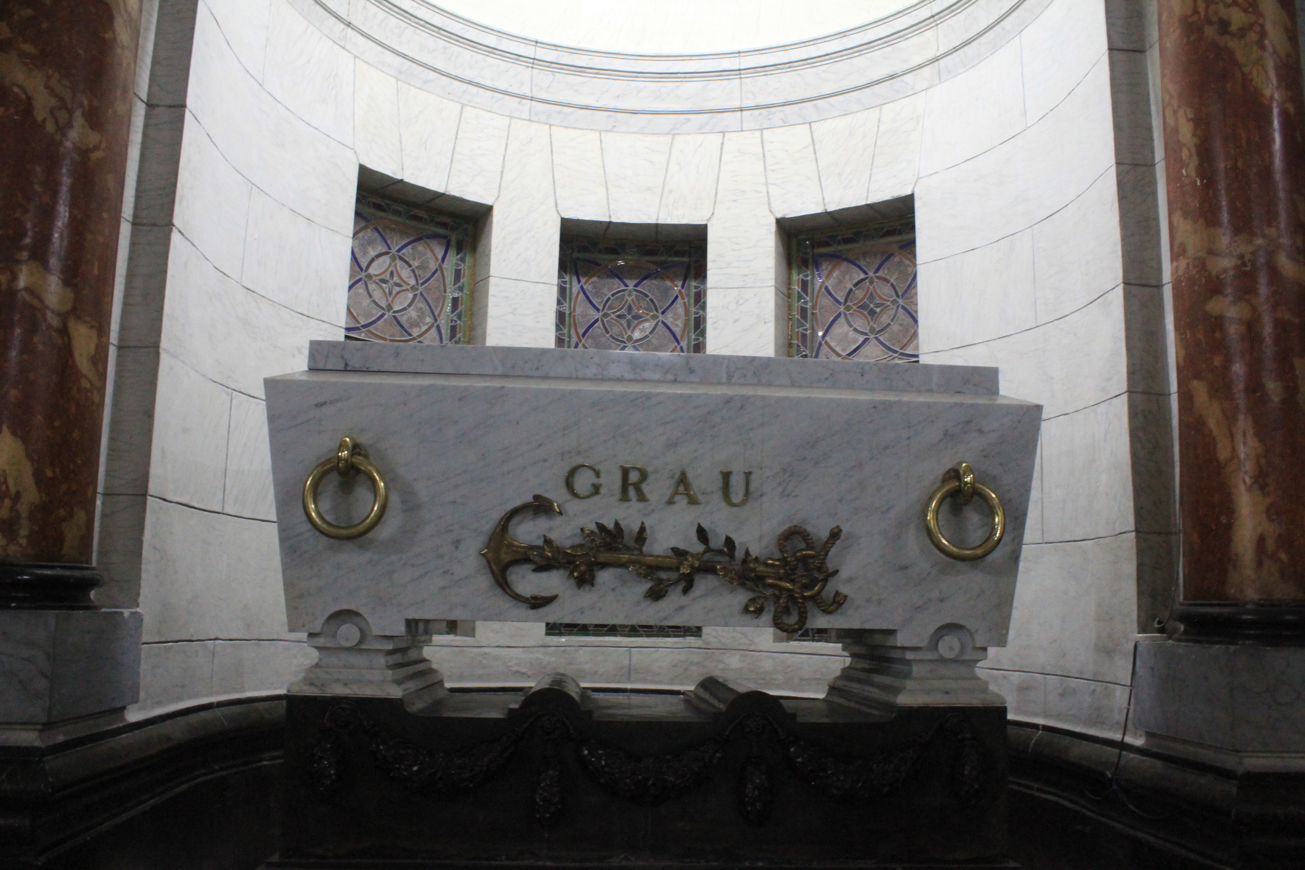 Cementerio Presbítero Maestro. Perú - Lima. Setiembre 2012